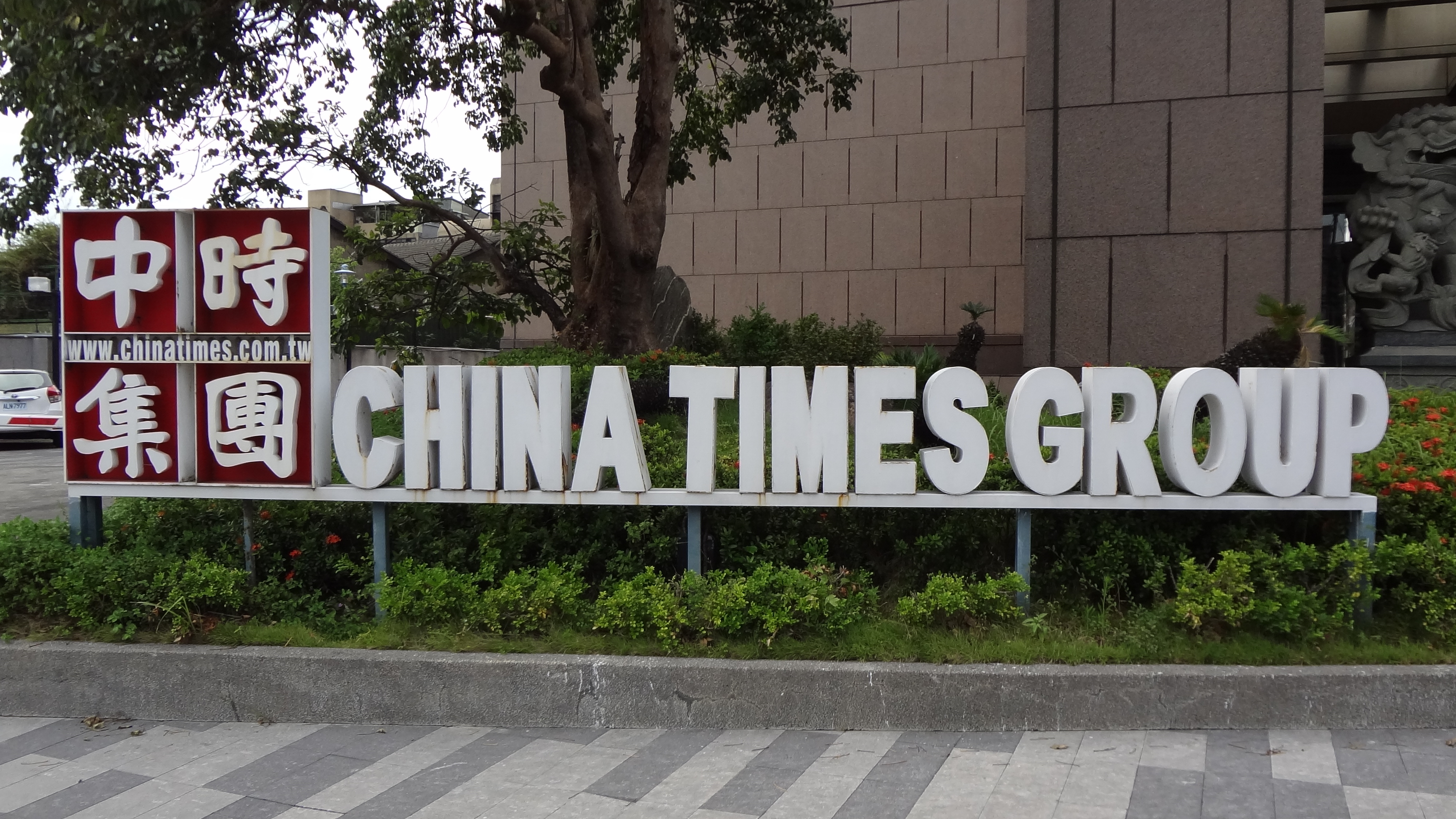 臺灣臺北市萬華區艋舺大道，時報大樓前方的中時媒體集團標誌。